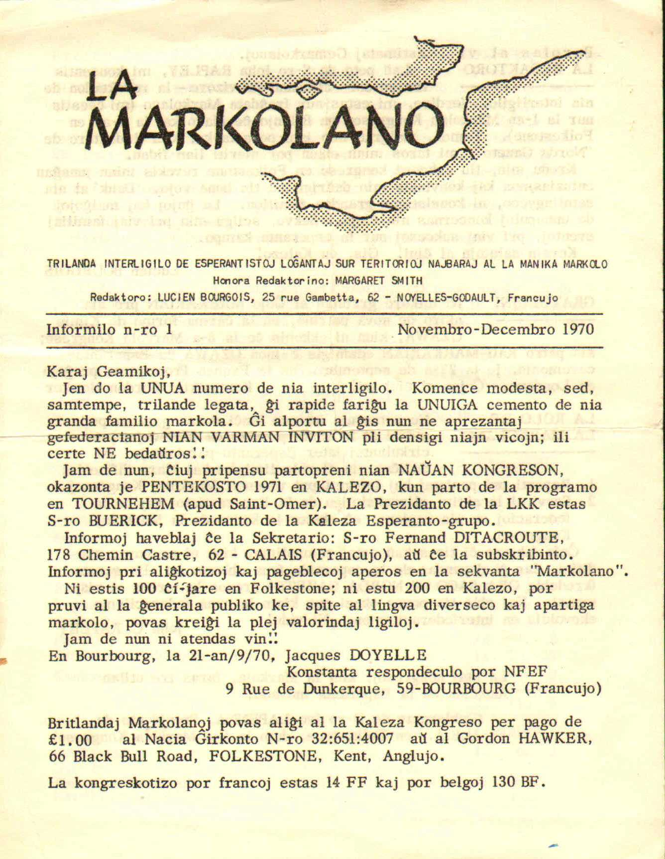 Unua numero de 'La Markolano', trilanda ligilo de esperantistoj logantoj sur teritoriaj najbaraj al la manika markolo. Redaktoro Lucien Bourgeois.